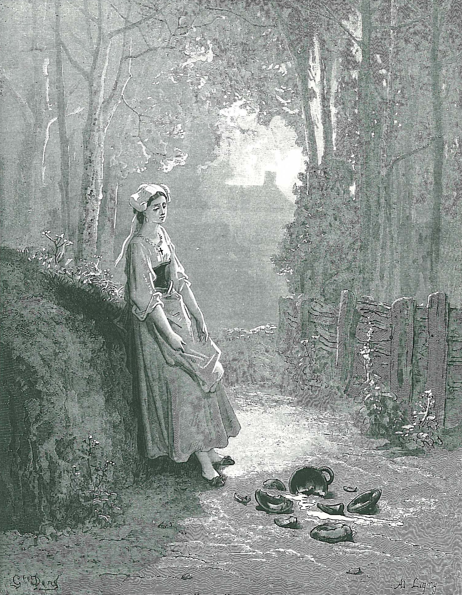 illustration for Jean de La Fontaine's fables by Gustave Doré